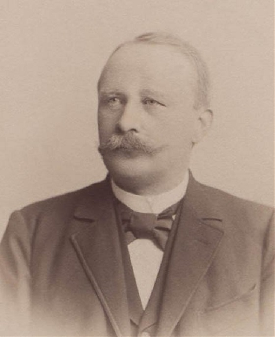 Alfred Hillebrandt (1823-1927) – niemiecki językoznawca, indolog, rektor Uniwersytetu Wrocławskiego